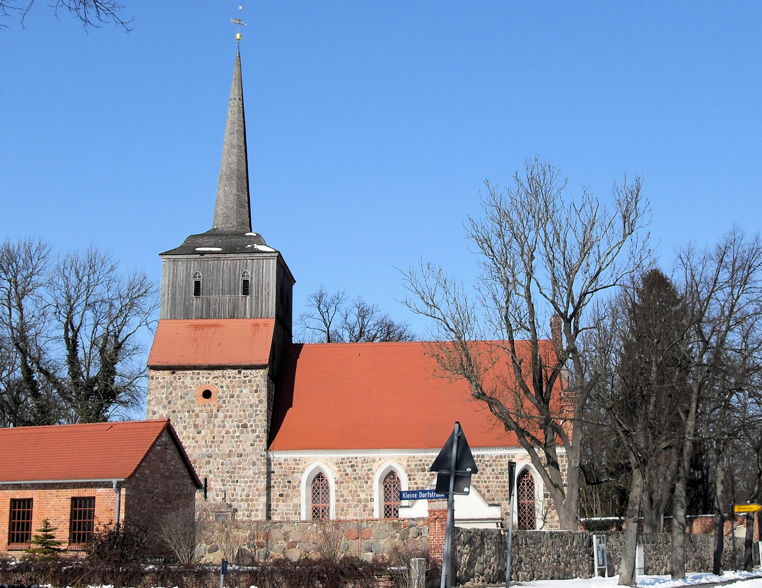 Dorfkirche Wartin (Ortsteil der Gemeinde Casekow)